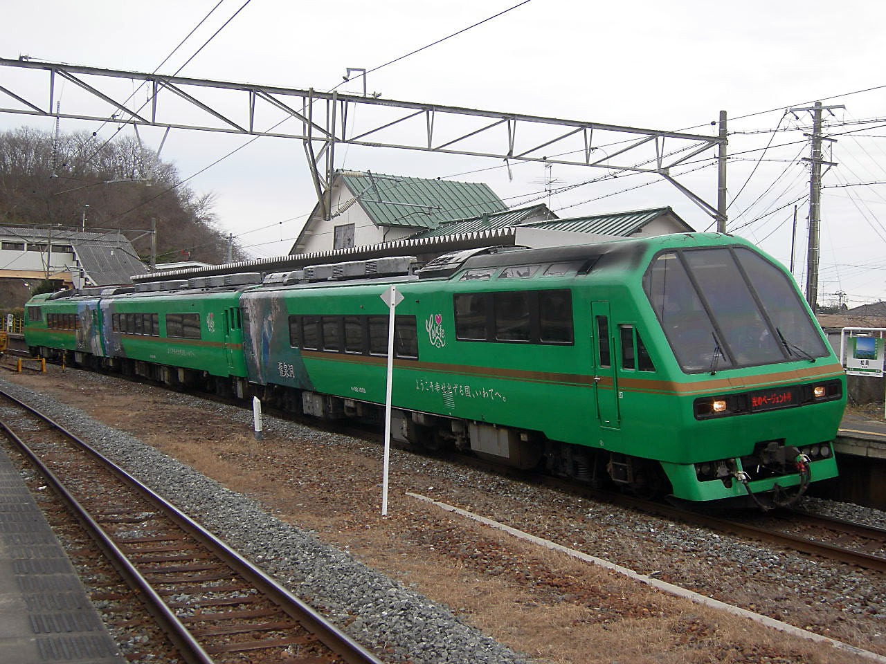 JR東日本 キハ58系ジョイフルトレイン「Kenji」（JR East Kiha58 joyfultrain "Kenji"）